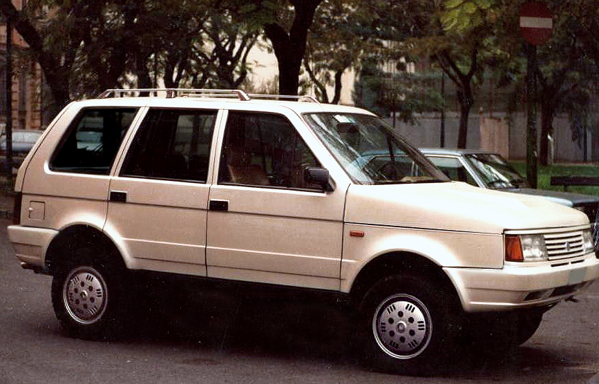 Rayton Fissore Magnum turbodiesel del 1986 fotografato nel settembre del 1991 da Alessio Averone